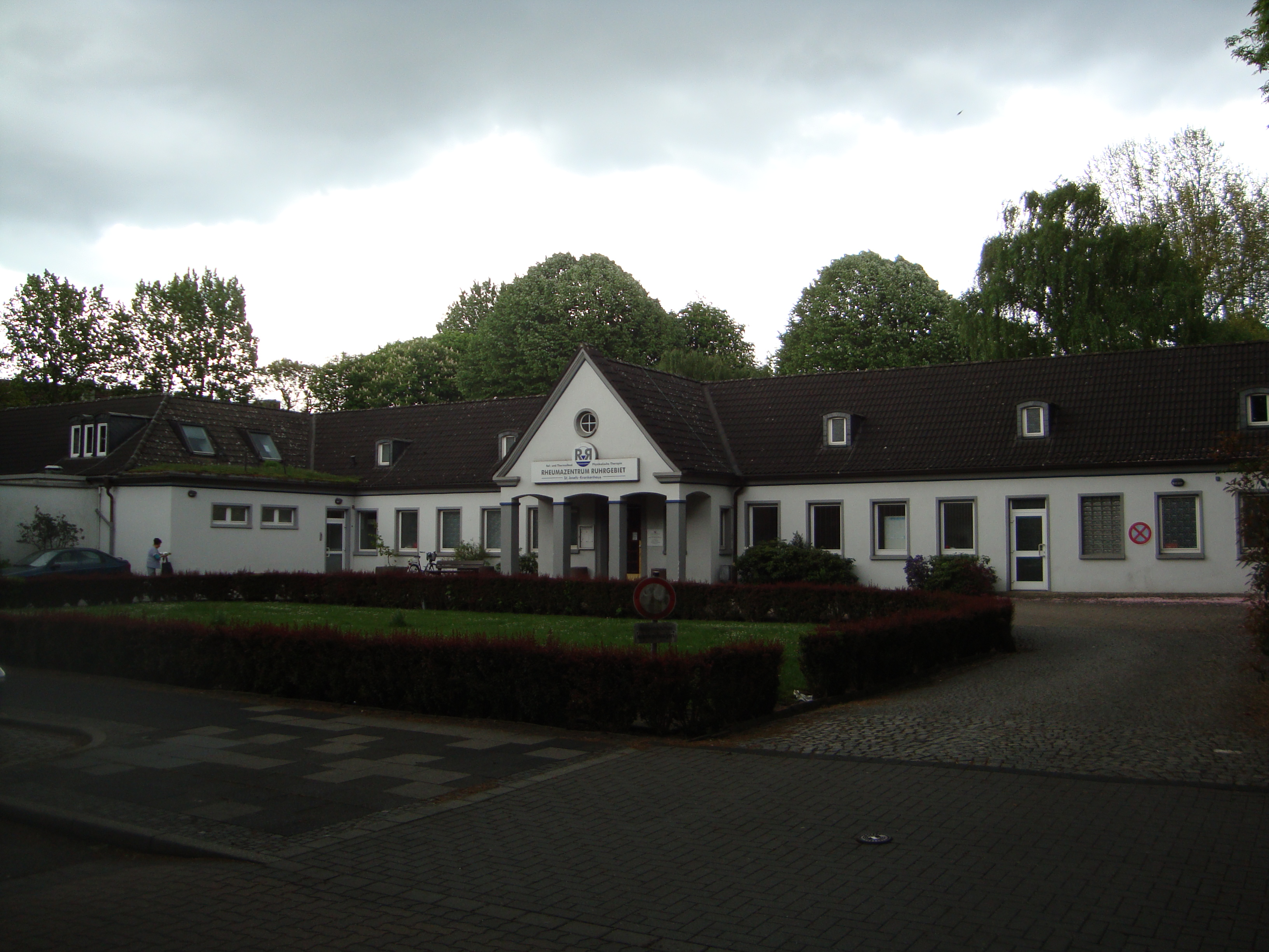 Klinikgebäude des Rheumazentrums Ruhrgebiet in Wanne-Eickel "Am Solbad" von Norden